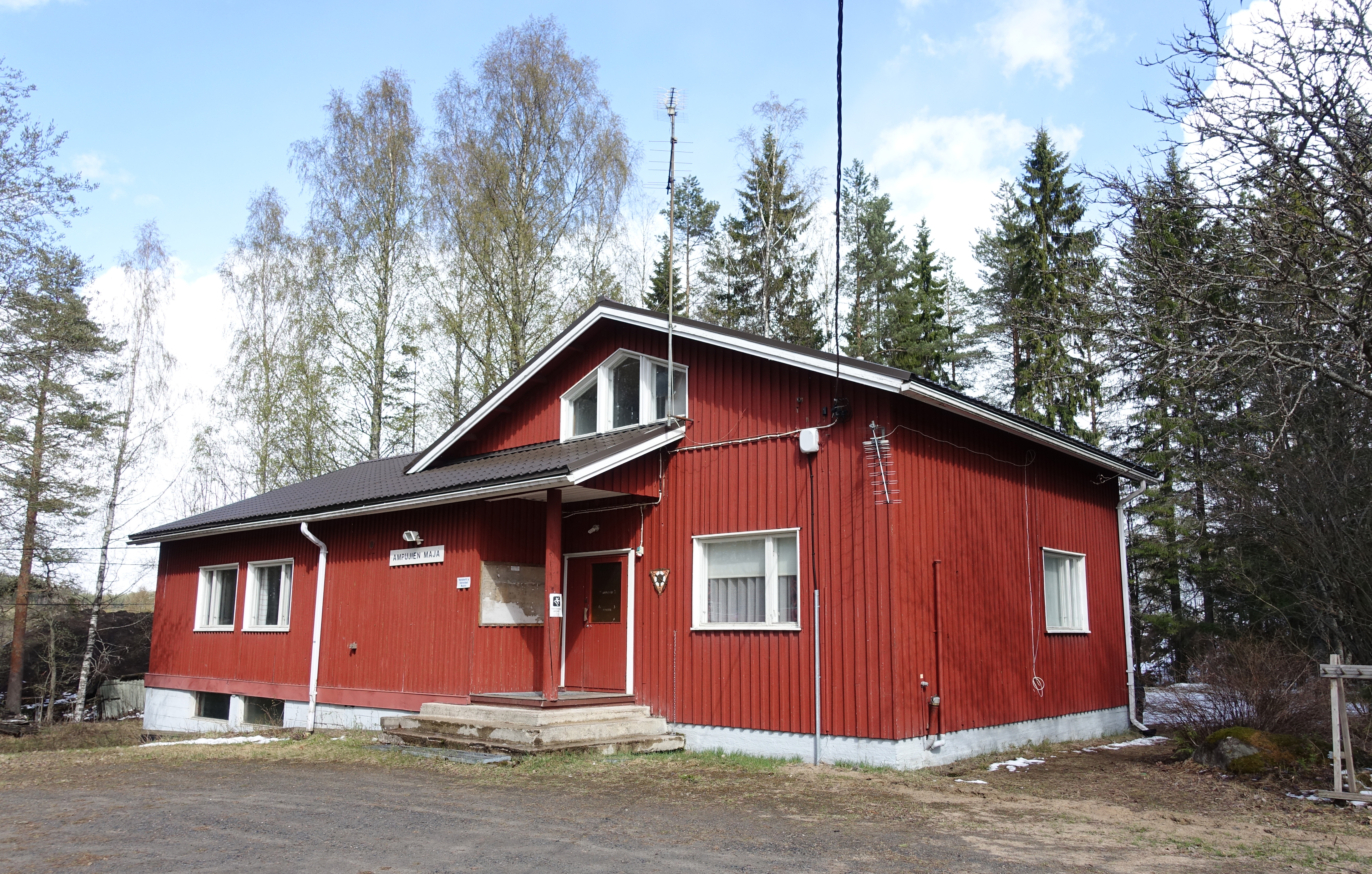 Ampujien maja Leppävedellä lähellä Jyväskylää.